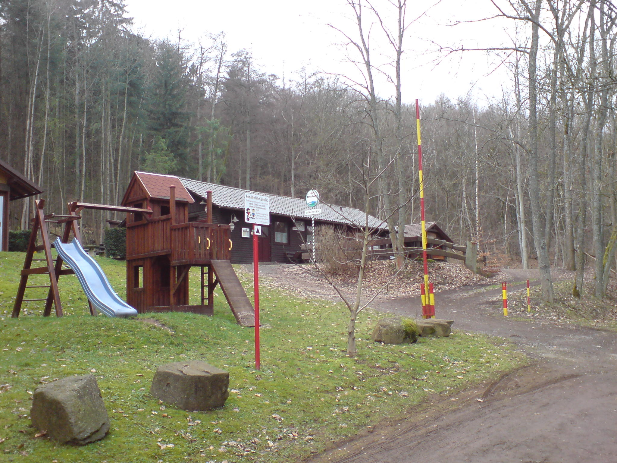 PWV-Hütte vorm Selberg auf dem Selberg bei Rutsweiler.